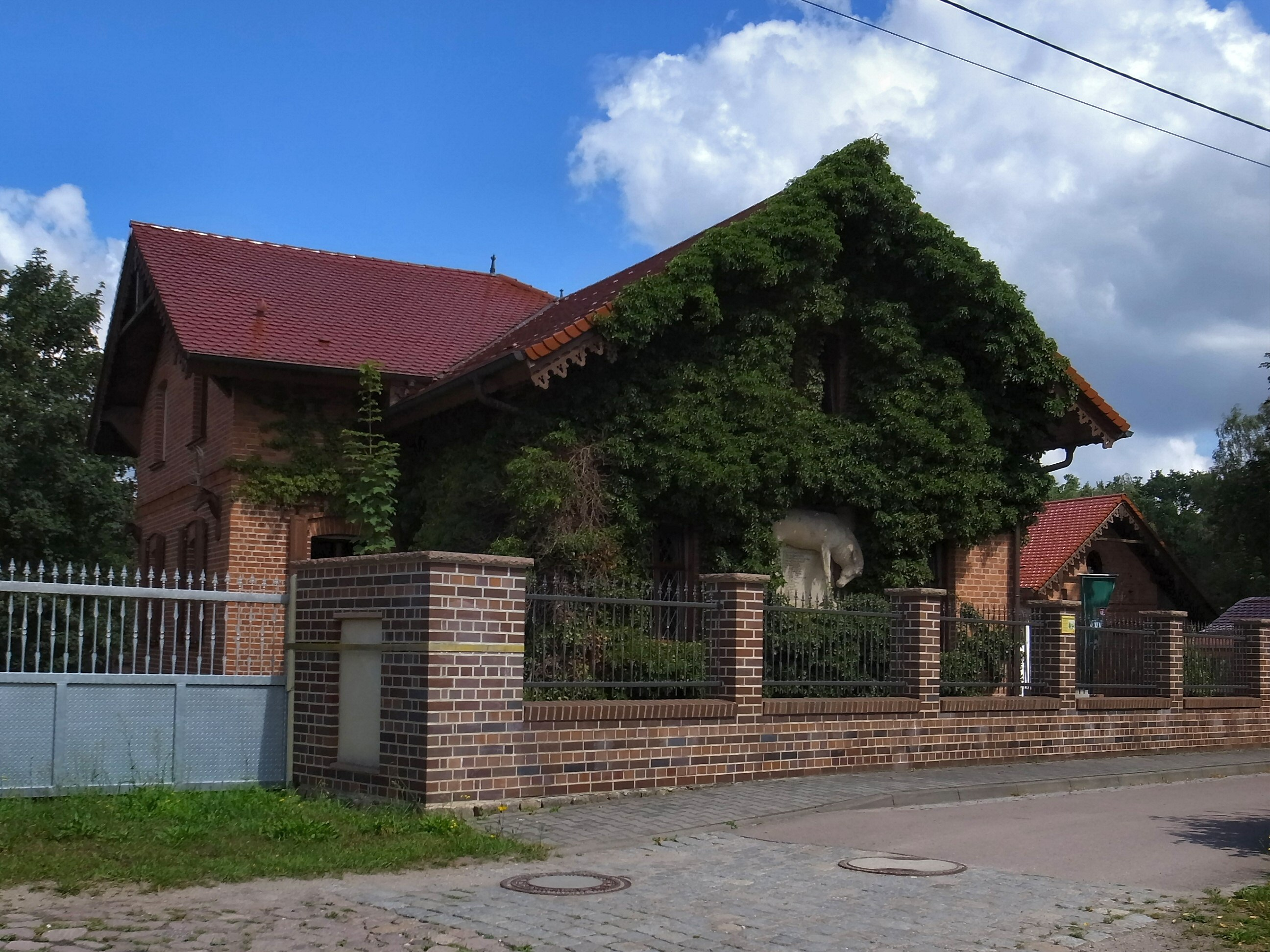 Südliches Anhalt, Ortsteil Diesdorf, Forsthaus Brambach (Baudenkmal im Denkmalverzeichniss Sachsen-Anhalt, Erfassungsnummer: 094 70902 000 000 000 000 [1])